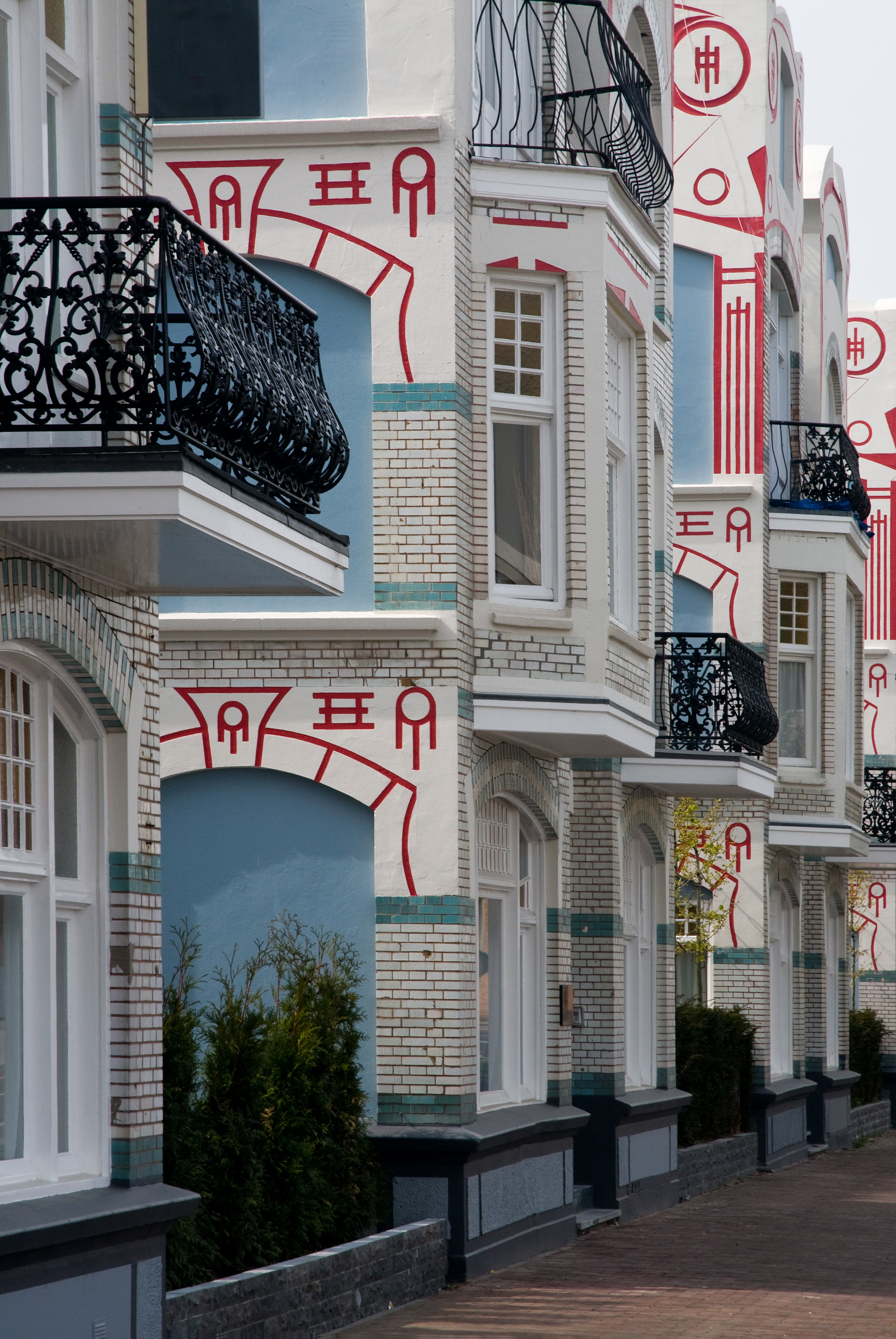 Vier loodsenhuizen op de spuistraat in Vlissingen